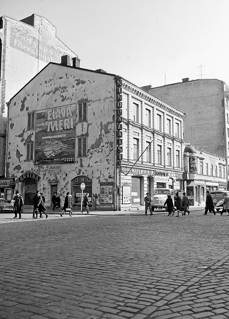 Valokuva Kinopalatsi-elokuvateatterista, joka sijaitsi Helsingissä Keskuskadun ja Pohjoisesplanadin kulmassa, nykyisen Akateemisen kirjakaupan paikalla.